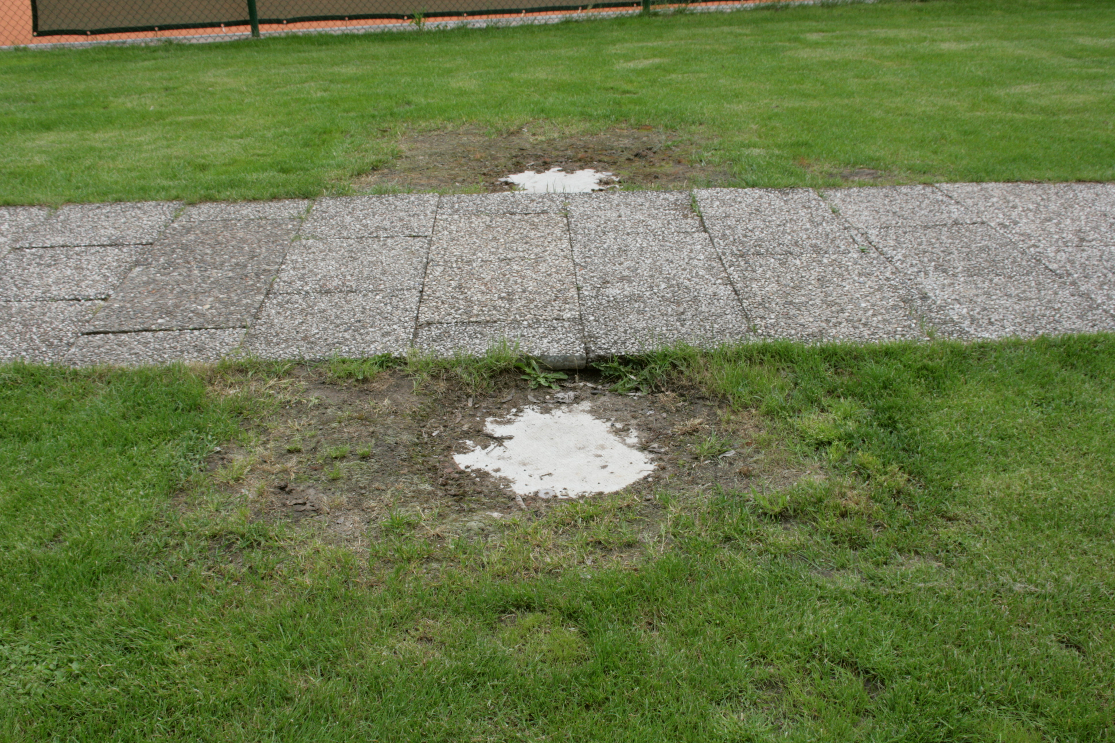 Ehemalige Zeche Ringeltaube, später Vereinigte Hamburg und Franziska in Witten-Annen